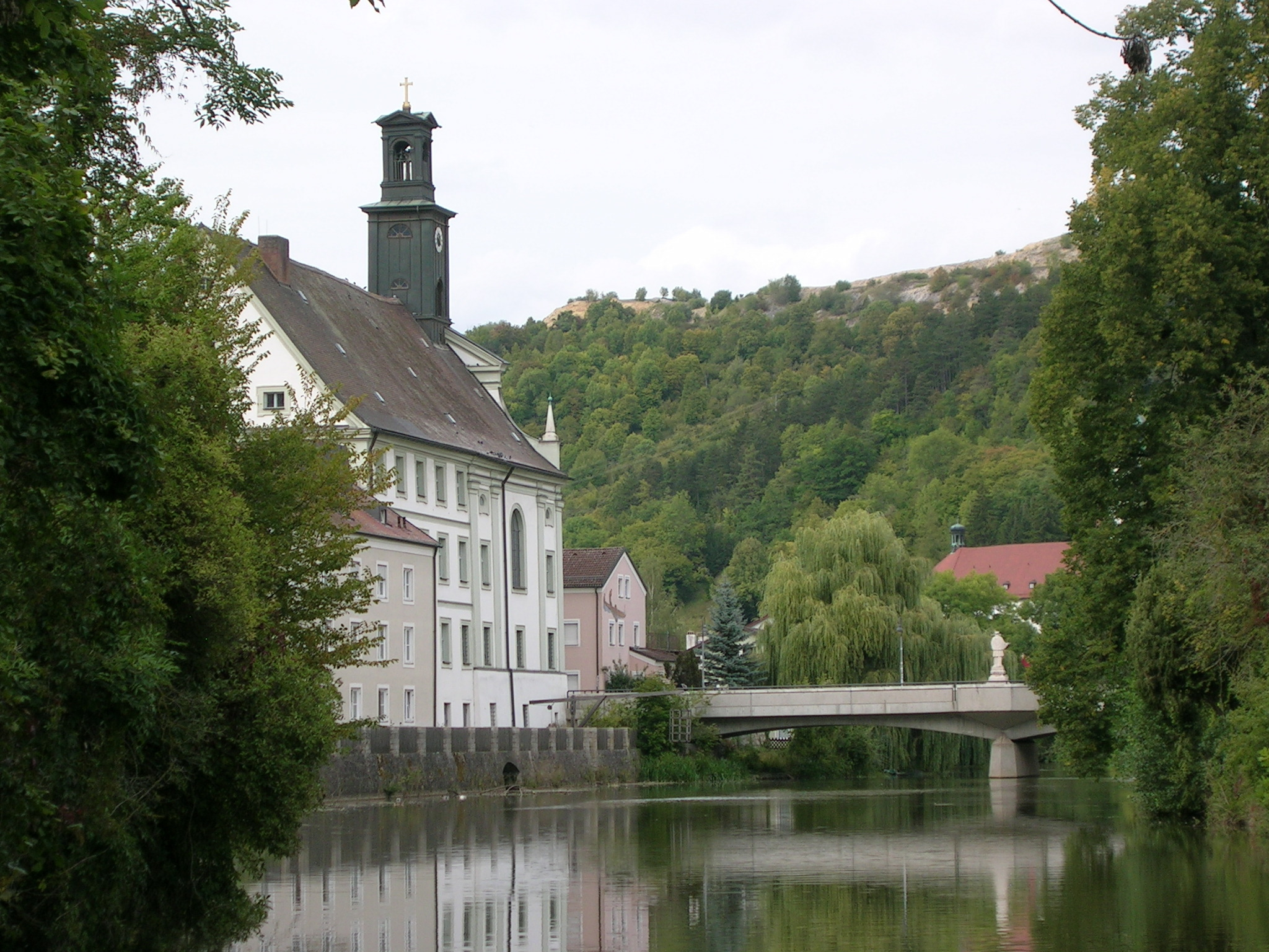 Ingolstädter Straße Eichstätt: Blick auf Spitalkirche Heilig Geist und Spitalbrücke.